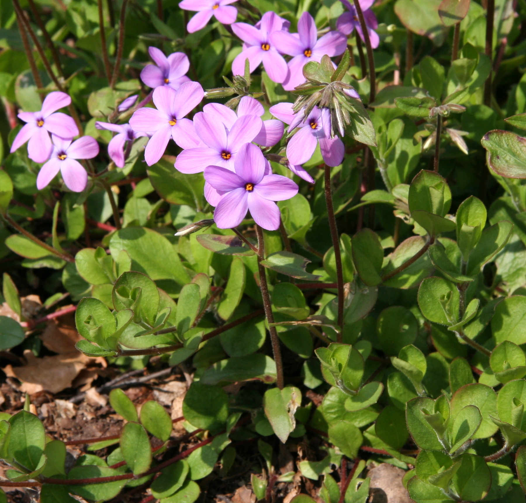 Phlox stolonifera im Botanischen Garten Dresden